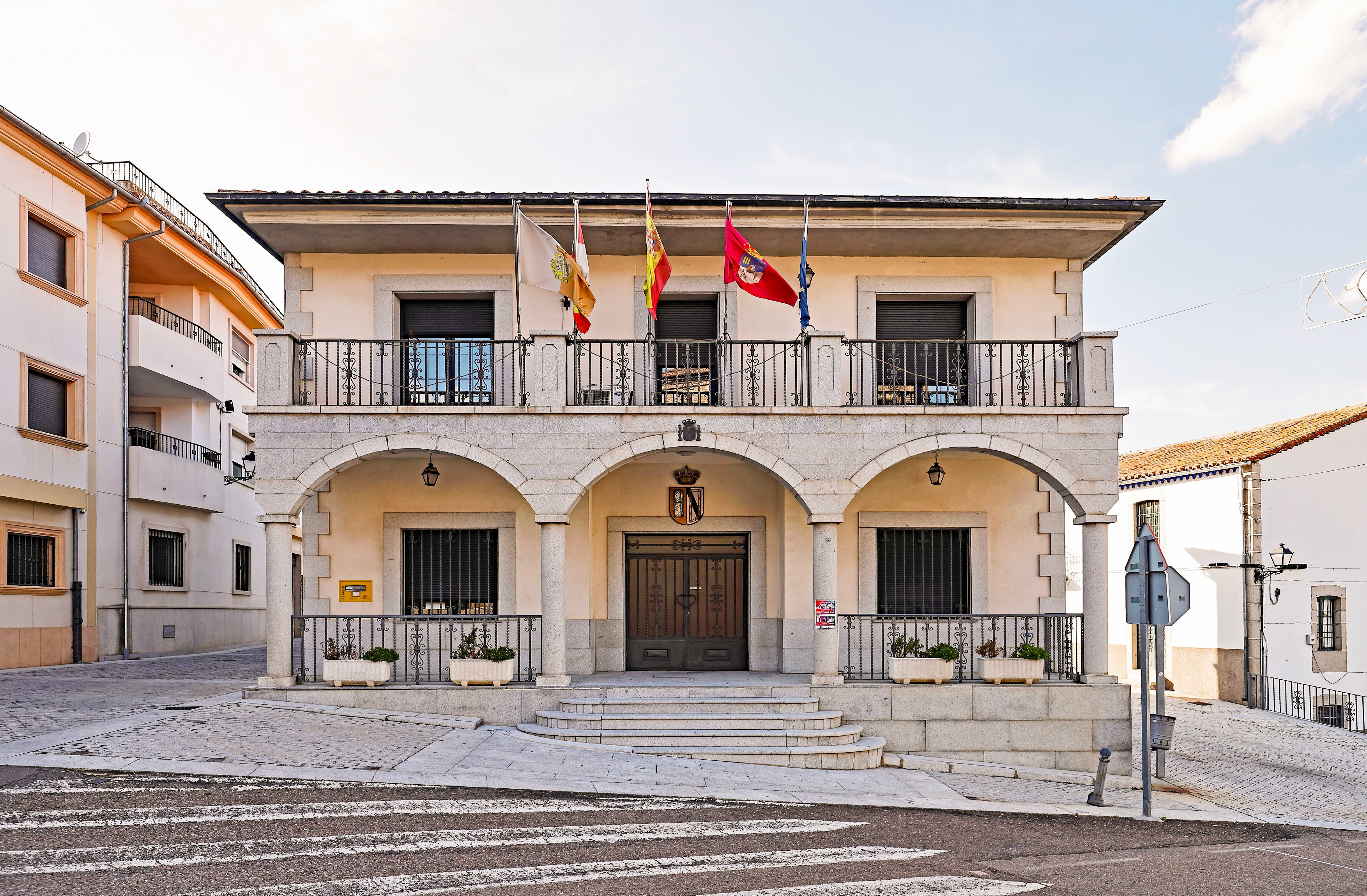 Ledrada es un municipio de la comarca Sierra de Béjar, provincia de Salamanca.